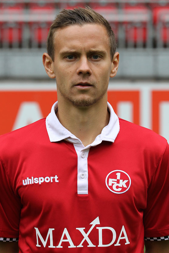 Chris Löwe